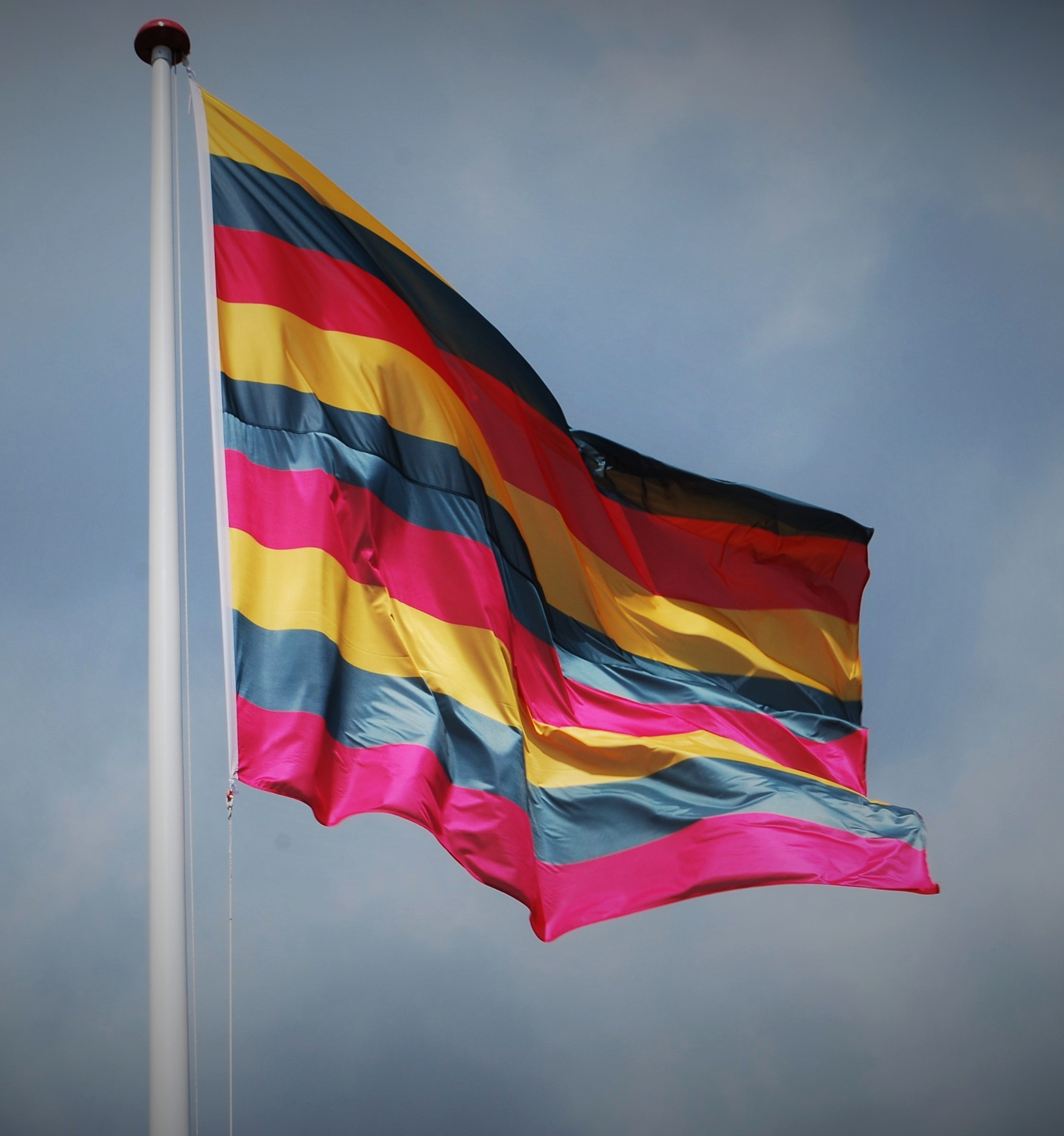 Ærøs flag